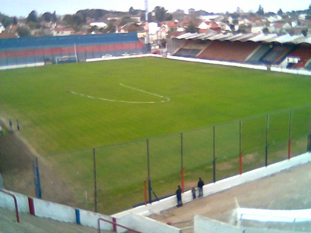 estadio del club atletico tigre, de Victoria, Buenos Aires